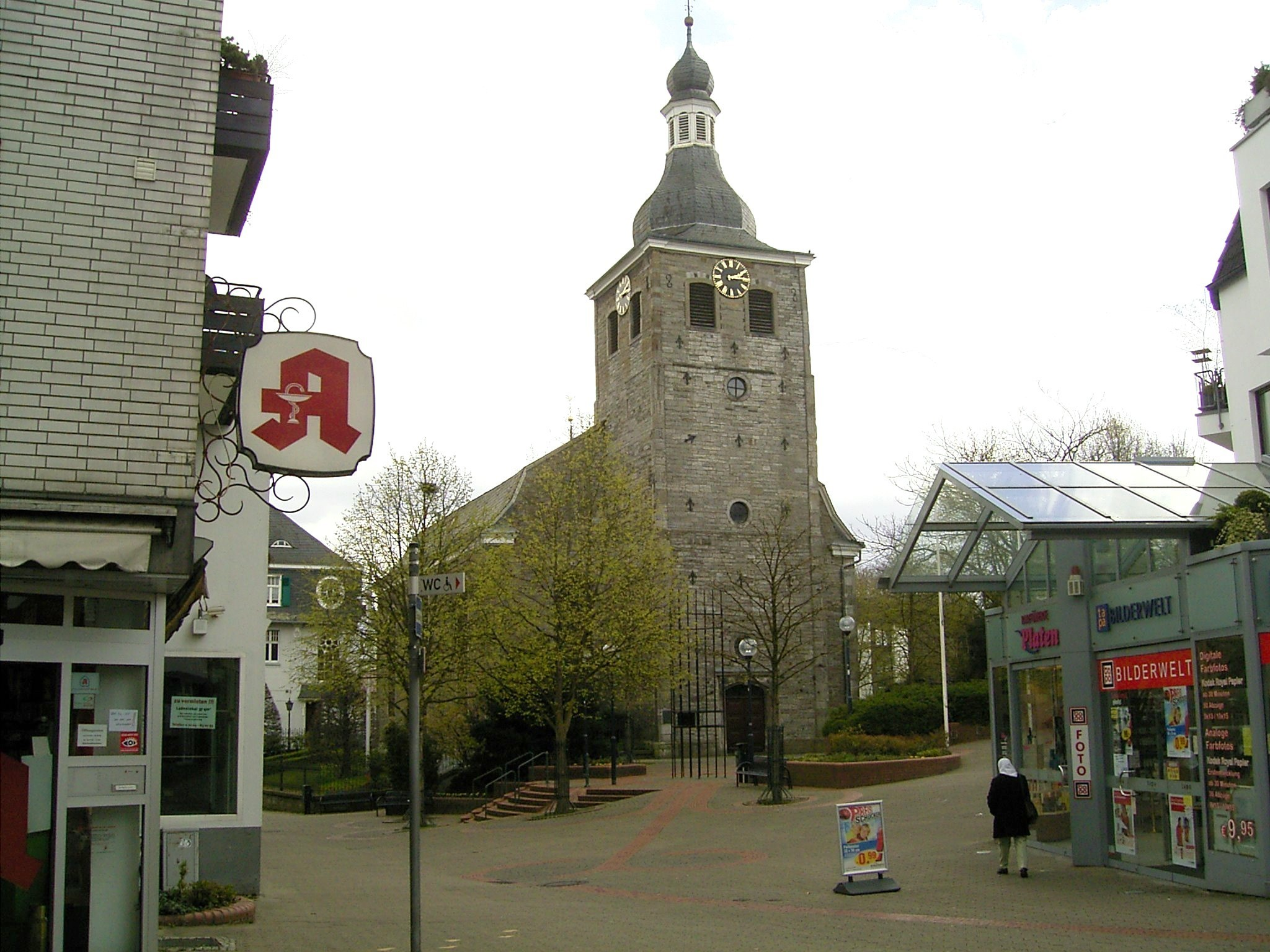 Evangelische Kirche in Mettmann